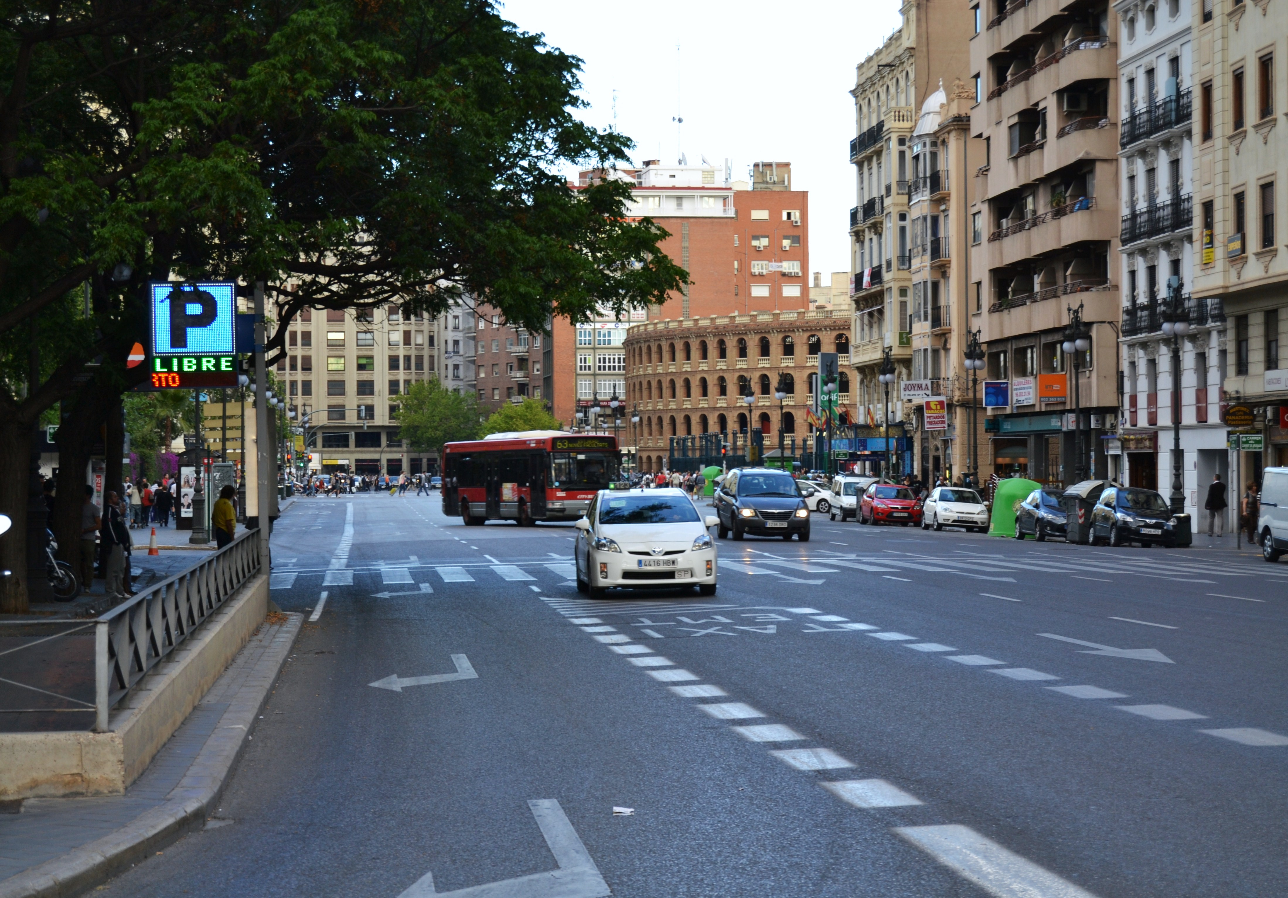 Carrer de Xàtiva des de la plaça de sant Agustí, València.